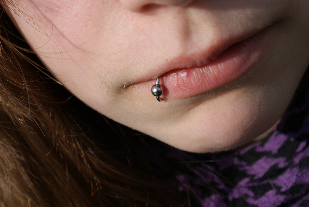 Labret piercing